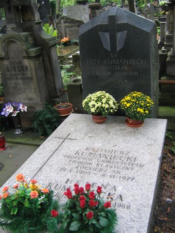 Kazimierz Kumaniecki's gravestone (Powązki Cemetery)